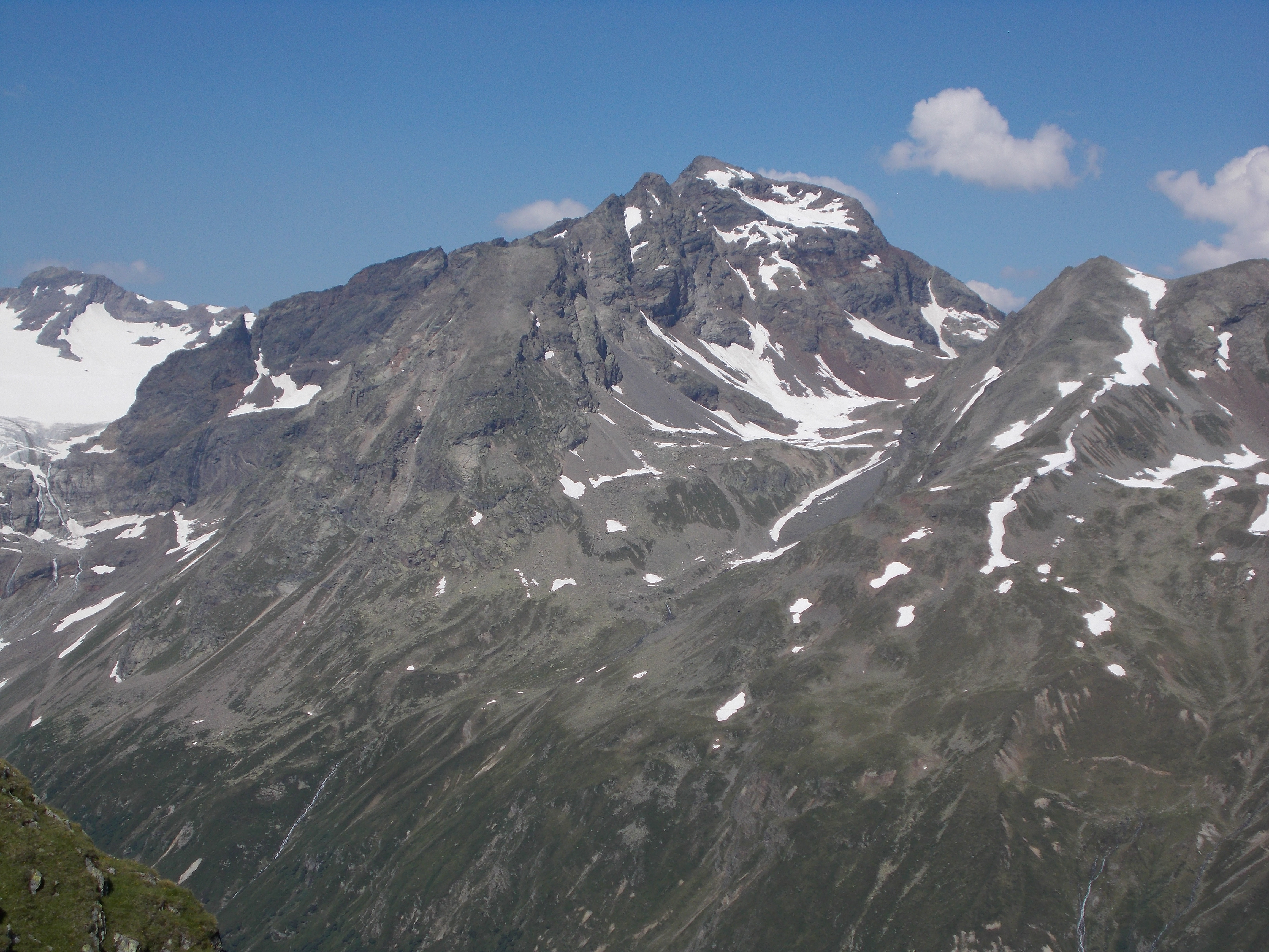 Piz Fliana von Südwesten, vom Sassautagrat aus ca. 2850 m Höhe